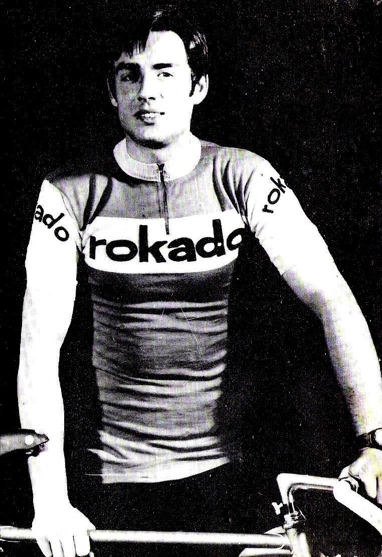 foto van Harrie Jansen als profwielrenner